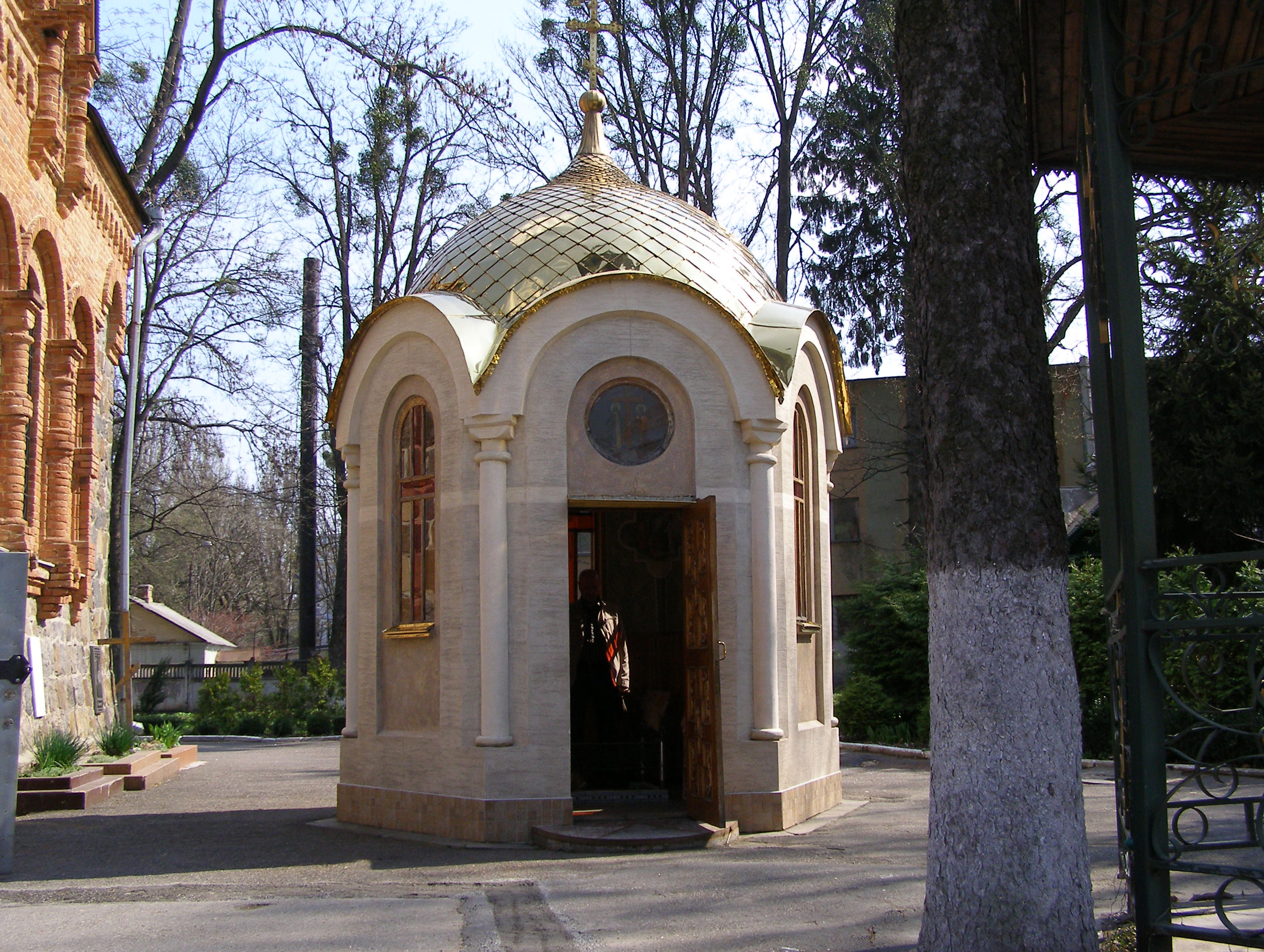 м. Вінниця, Свято-Воскресенська церква (Хмельницьке шосе, 5). Каплиця